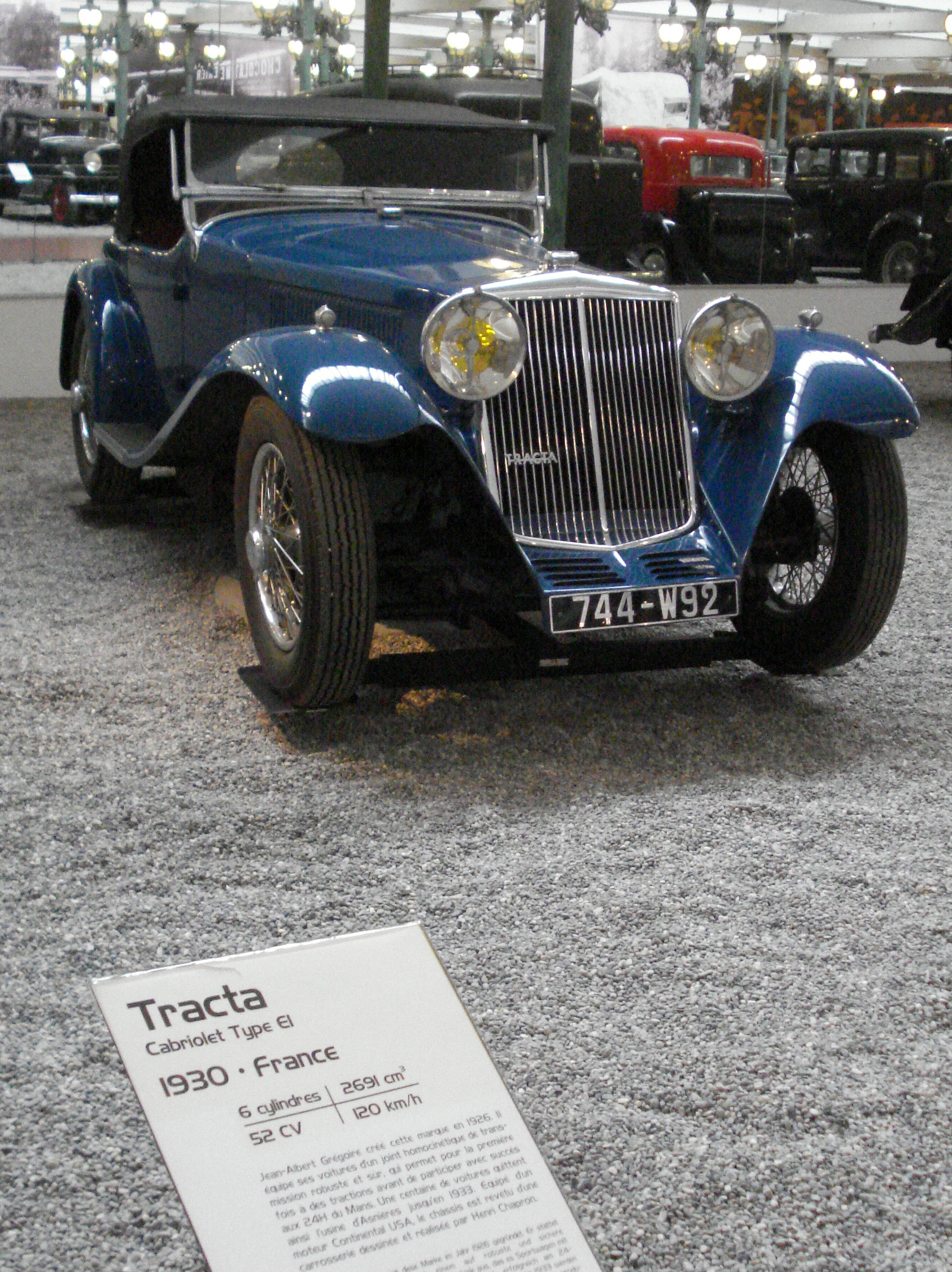 Cité de l’Automobile